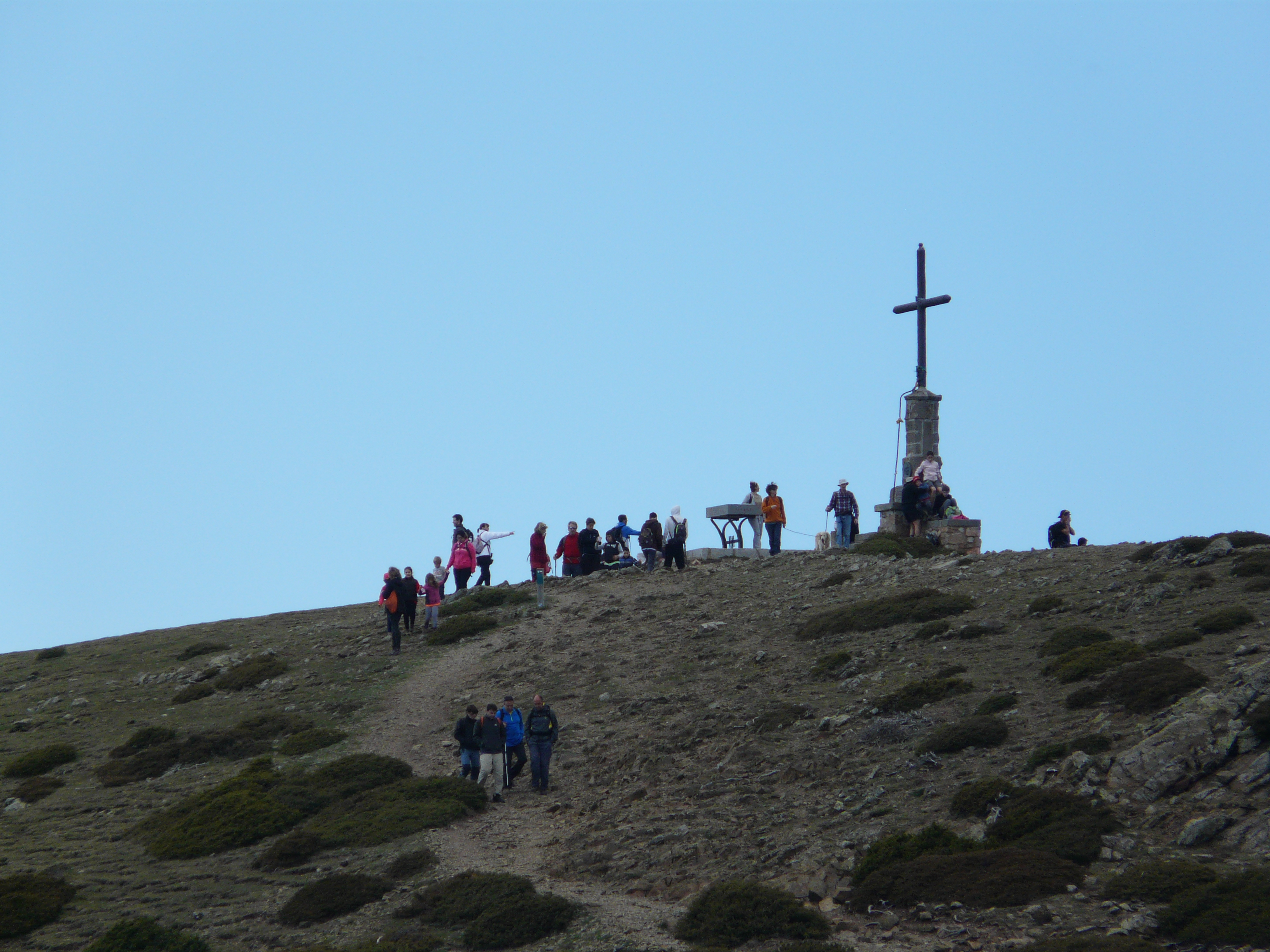 Matagalls (Osona) (Viladrau). Massís del Montseny. This is a a photo of an emblematic summit in Catalonia, Spain, with id: CE-294106006 Object location41° 48′ 31.66″ N, 2° 22′ 57.86″ E